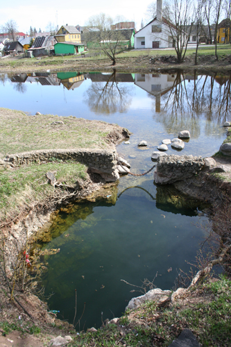 Žalsvasis šaltinis ir Lėvens upė. Foto: Vidmantas Balkūnas